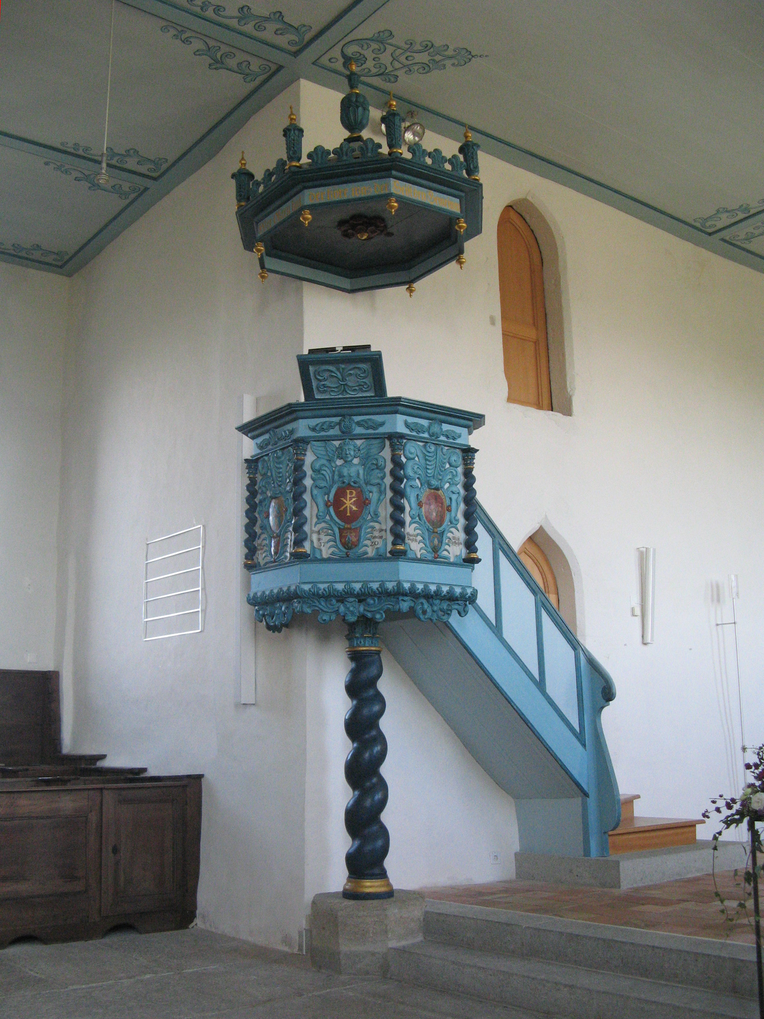 Kanzel der Staufbergkirche (1720)